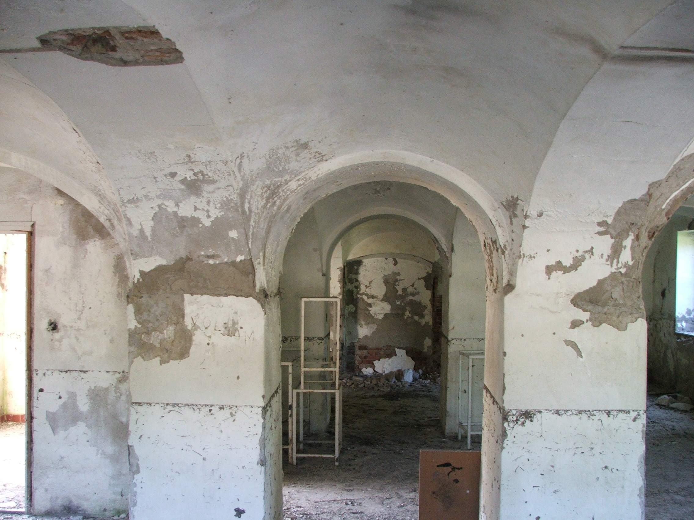 Révészek kocsmája, helyi védelem alatt álló épület